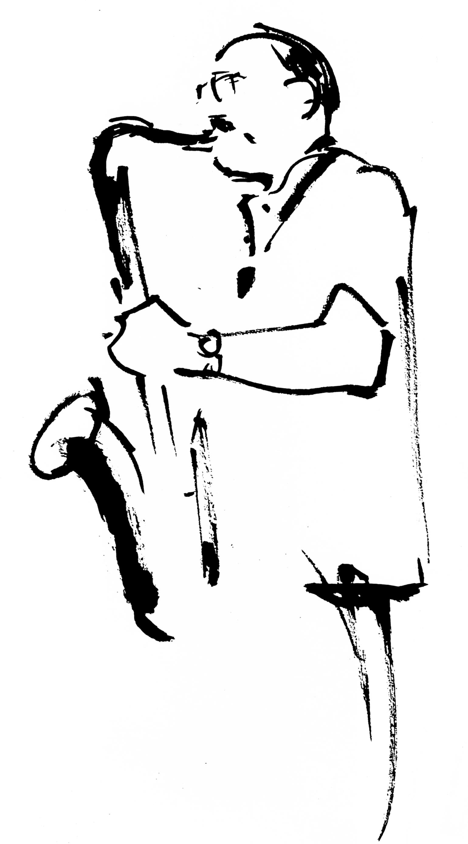 Guy Lafitte, croquis au festival Jazz in Marciac, 1991